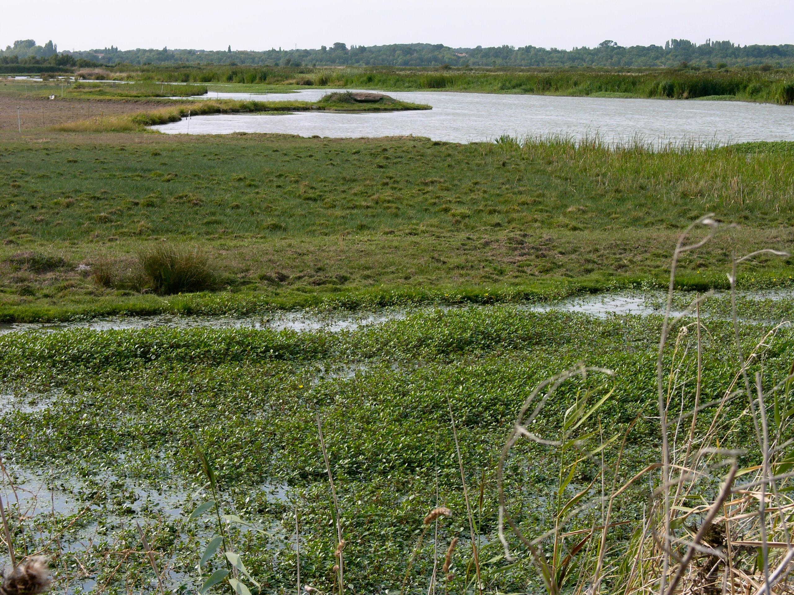 Marais de Flandre et de la Cabane Fouras Charente Maritime France